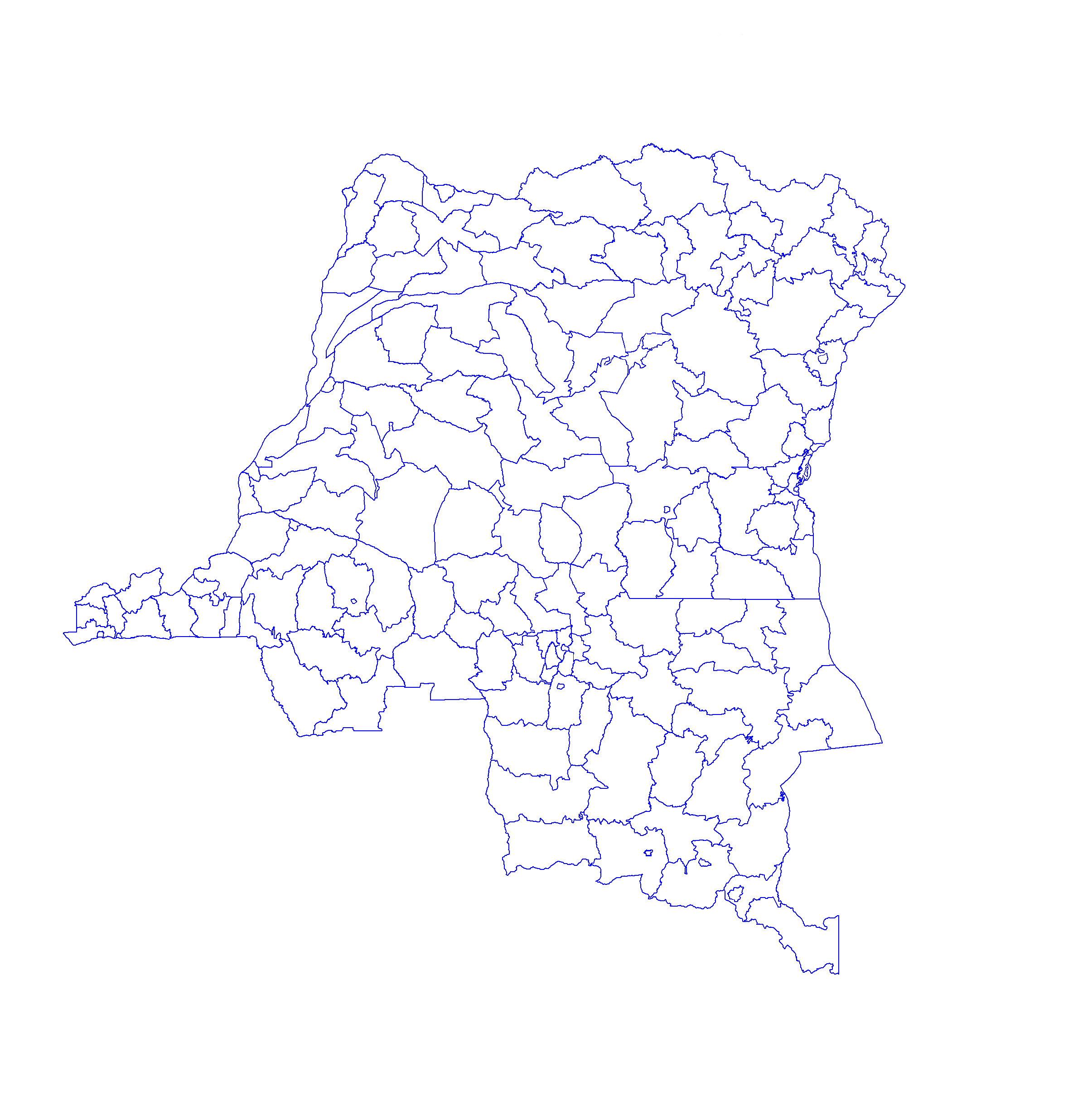 Carte des Territoires du RDC